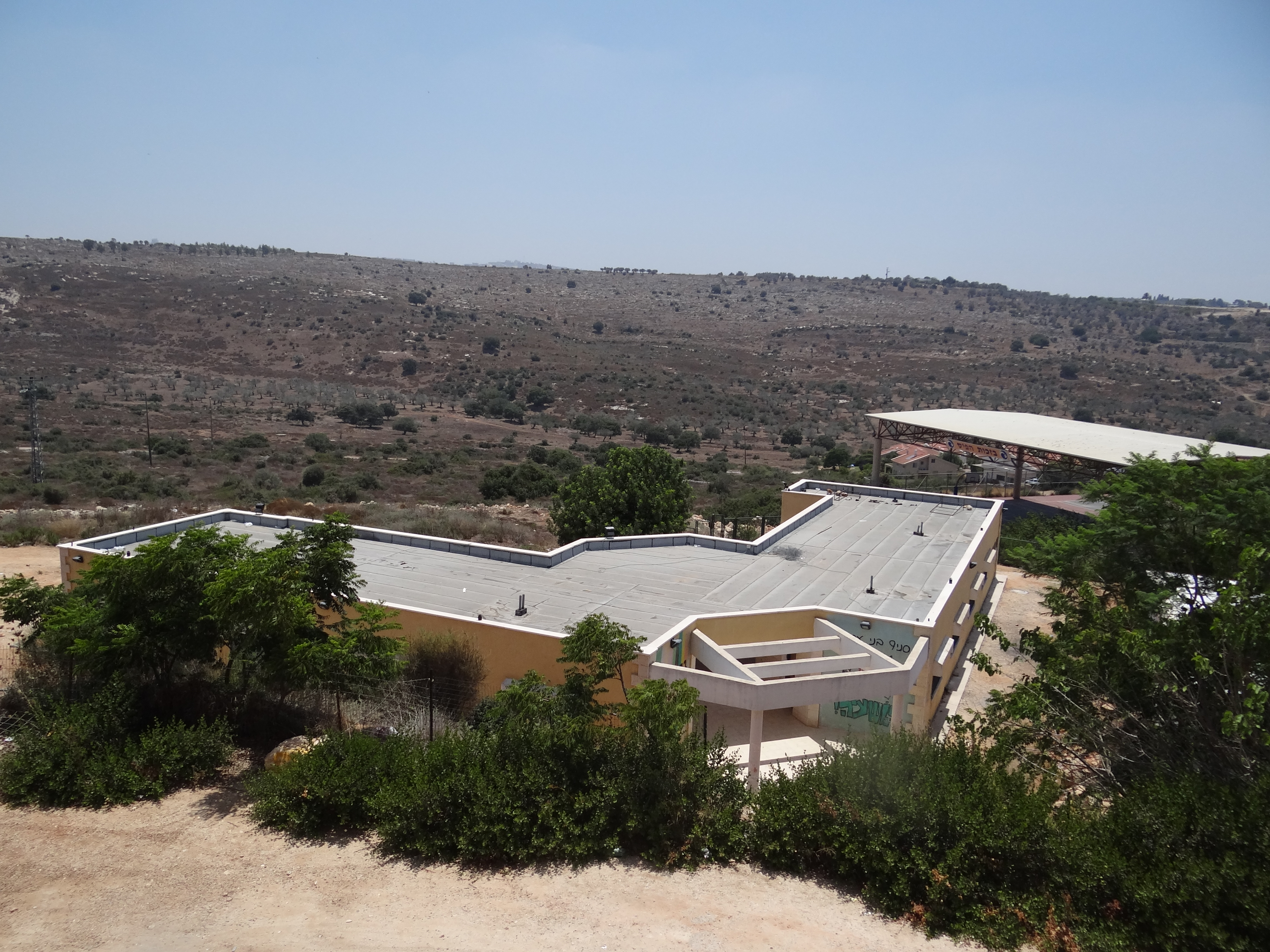 מבנה סניף בני עקיבא ביישוב הושעיה בגליל תחתון